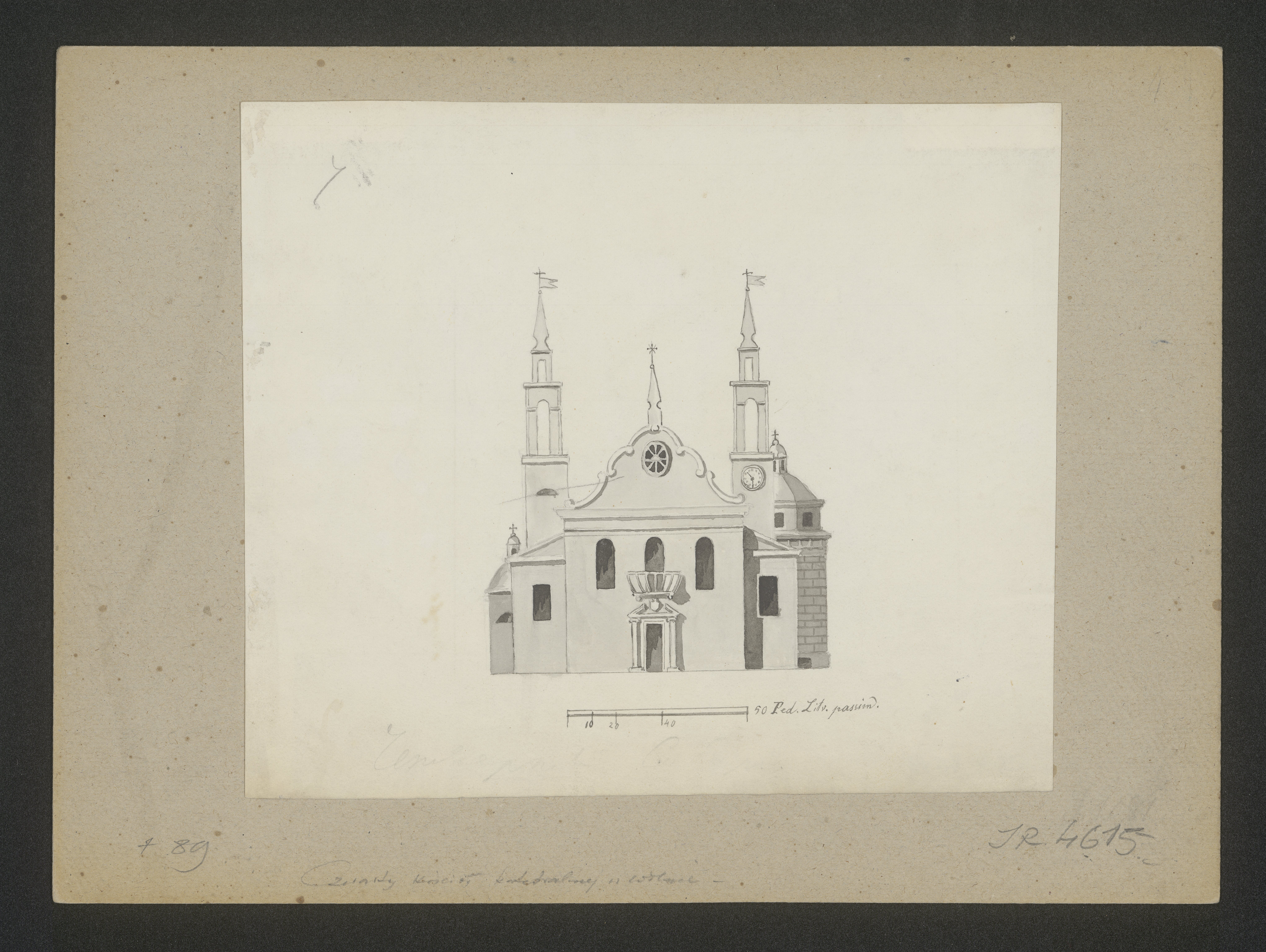 Беларуская (тарашкевіца): Вільня (Vilnia), Катэдра. Рэканструкцыя на 1632 год